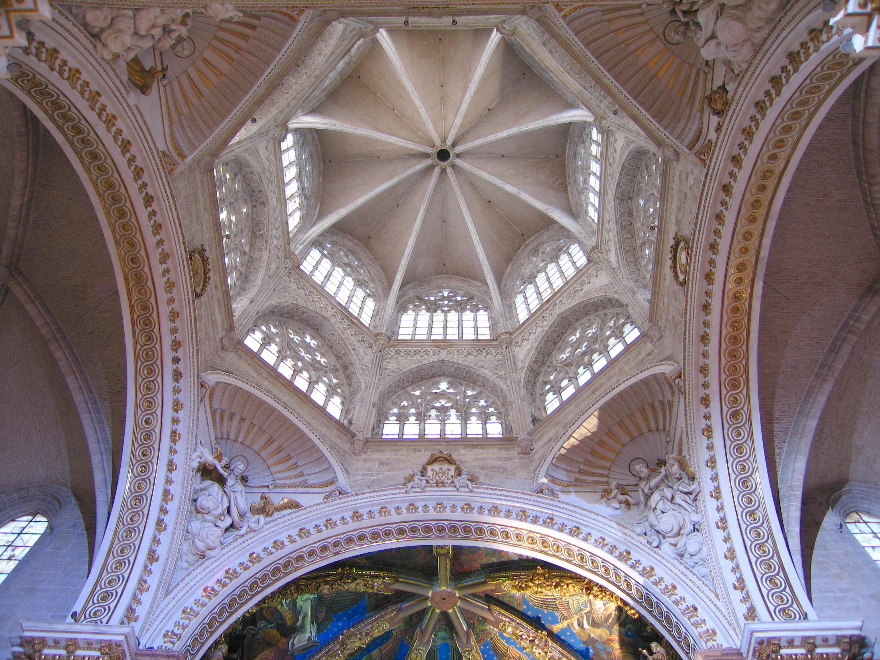 Vista interior del cimborri de la seu de València